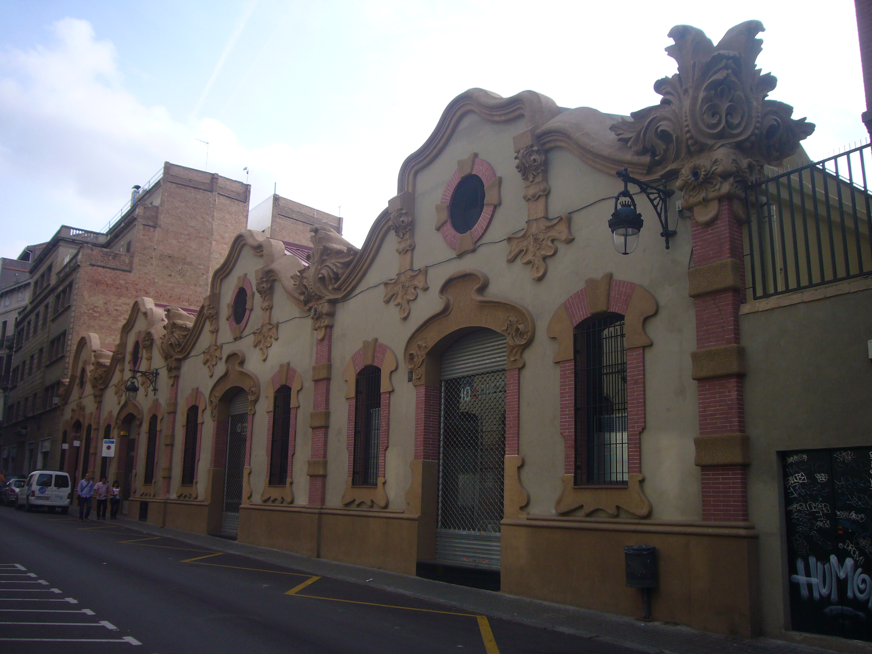 Façana del magatzem modernista de l'empresa Serra i Balet, situat al carrer d'Ortigosa, Barcelona.